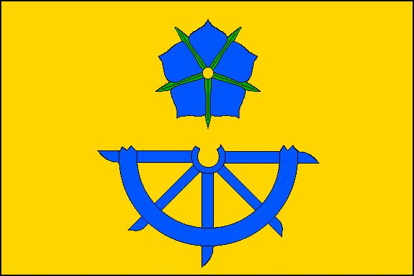 Vlajka obce Pístina